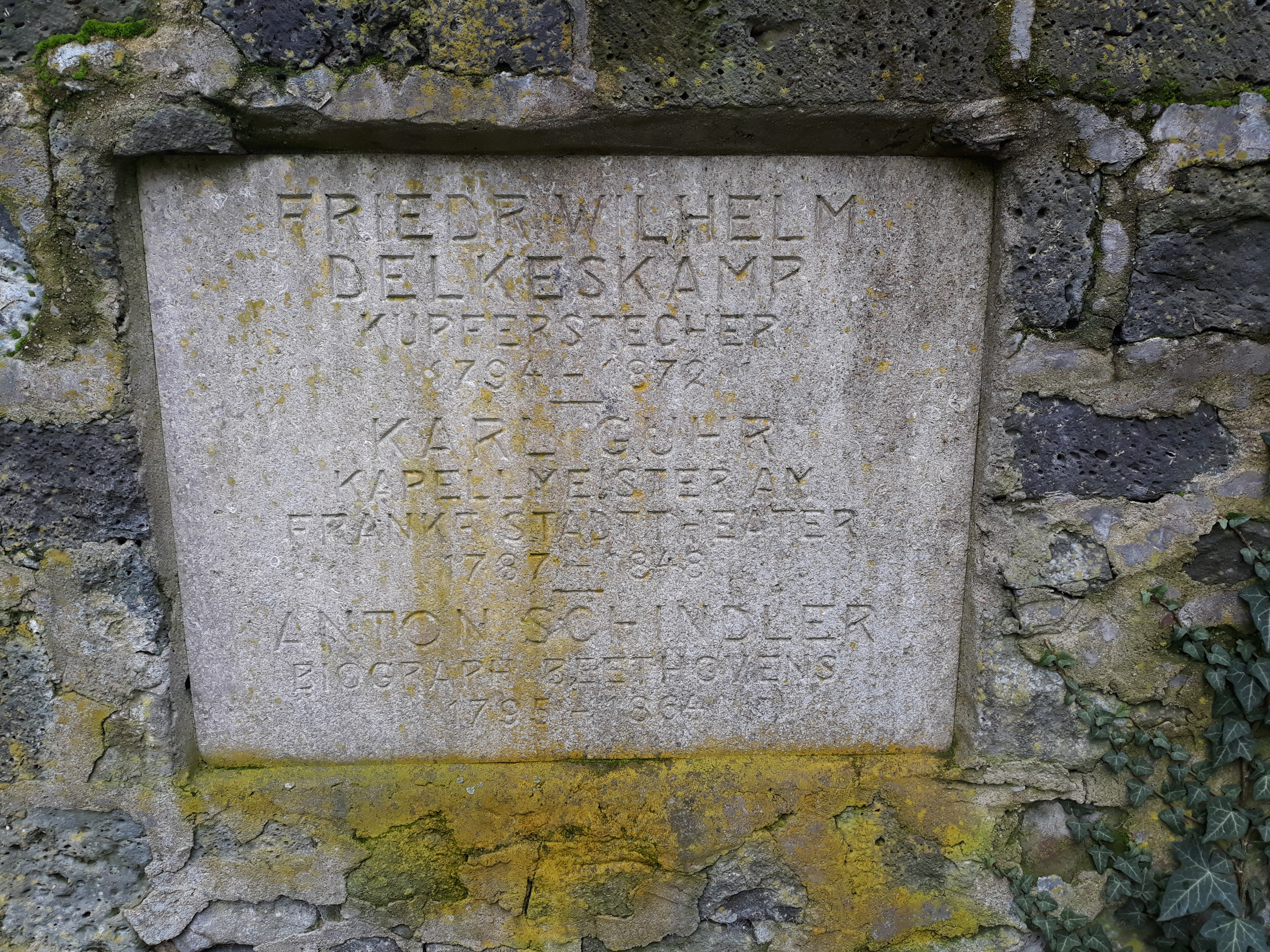 Gedenktafel für das Grab des Beethoven-Biographen Anton Schindler auf dem alten Friedhof Bockenheim in Frankfurt am Main.